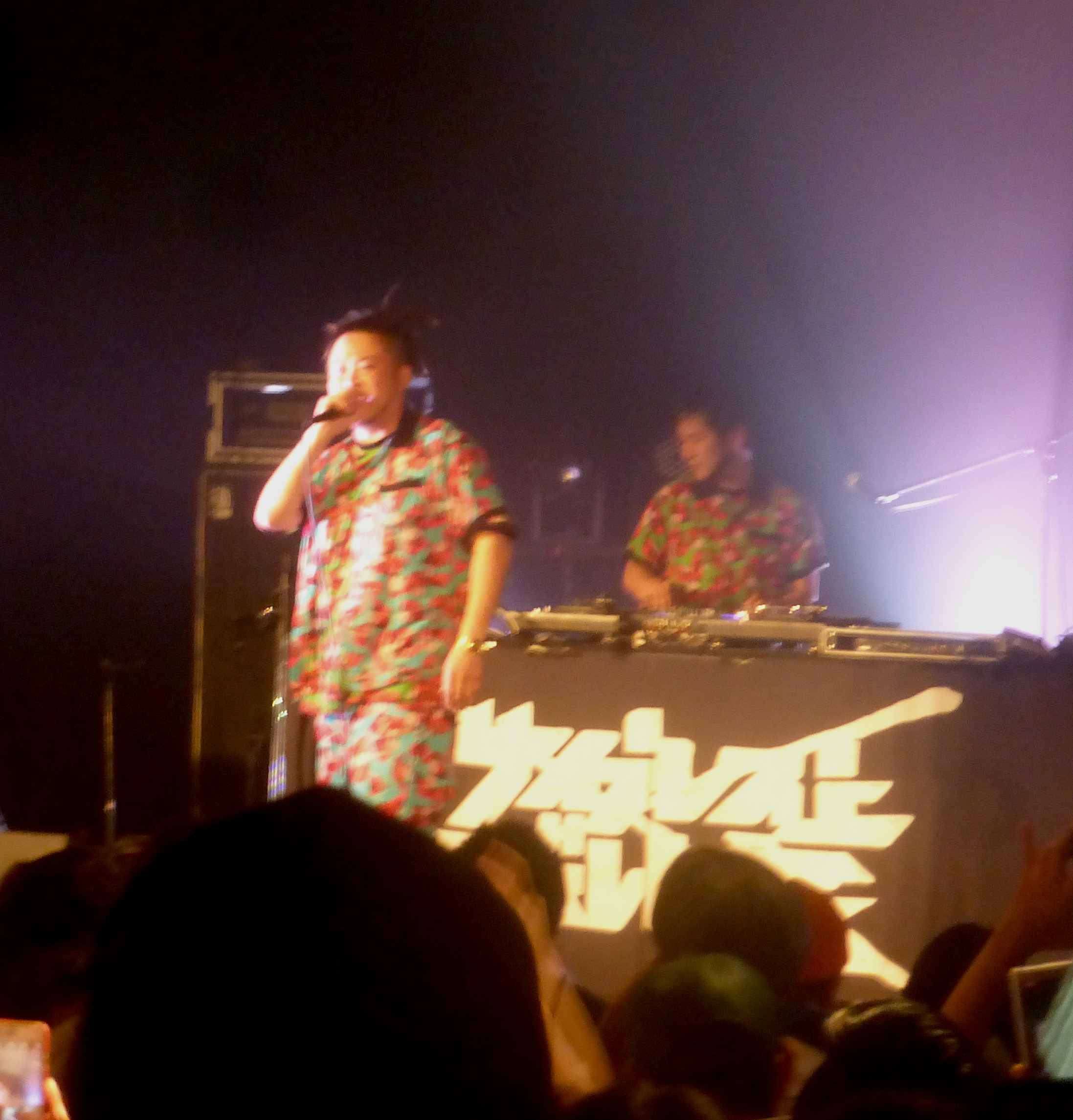 サイプレス上野とロベルト吉野のライブ、東京にて